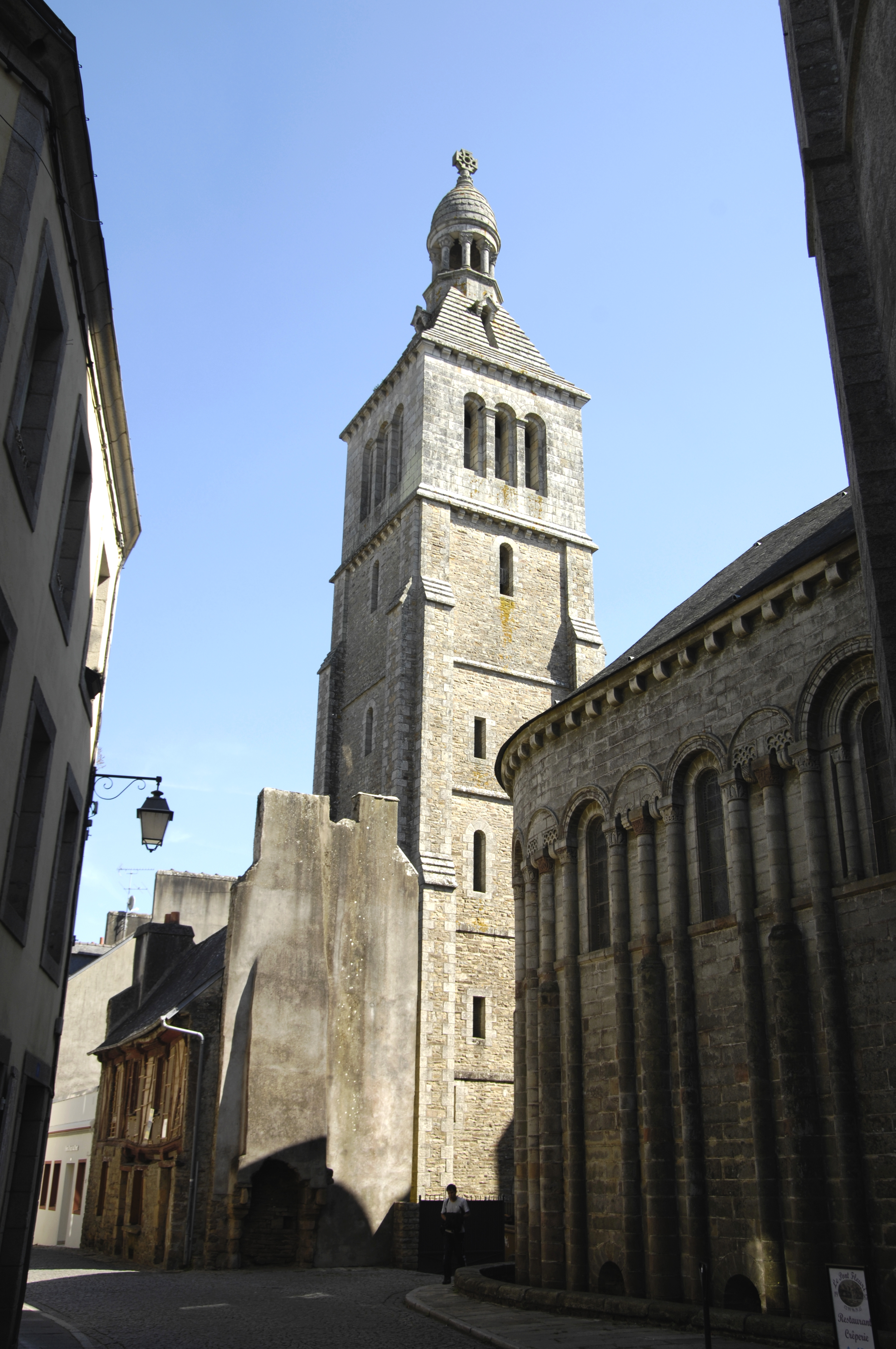 Clocher de l'abbatiale Sainte-Croix de Quimperlé (29).